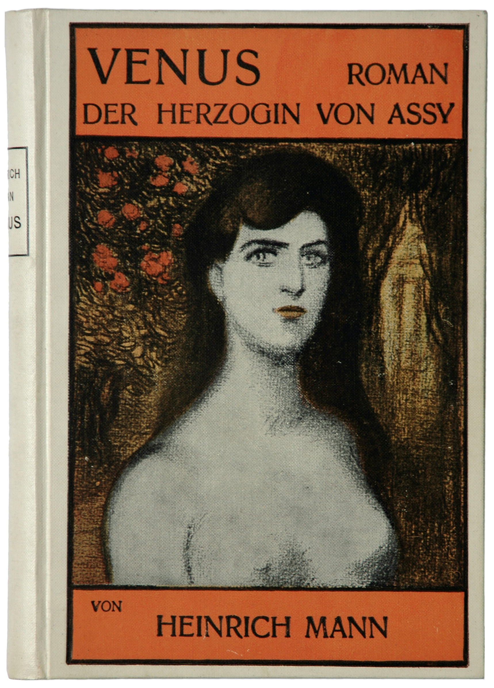 Mann, Heinrich: Die Göttinnen oder die drei Romane der Herzogin von Assy. München: Langen 1903, Bd. III: Venus 317 S., Erstausgabe. Das Frauenbildnis auf dem vorderen Buchdeckel (Einbandgestaltung) ist anonym. Ob es sich dabei um ein Porträt handelt, bleibt offen. Der Buchgestalter konnte nicht ermittelt werden. Er signiert rechts unten mit B. S. C., gerahmt von einem Herz 4 x 4 mm. In der Heinrich Mann-Bibliographie von Edith Zenker (1967) wird der Buchgestalter der Erstausgabe nicht erwähnt.